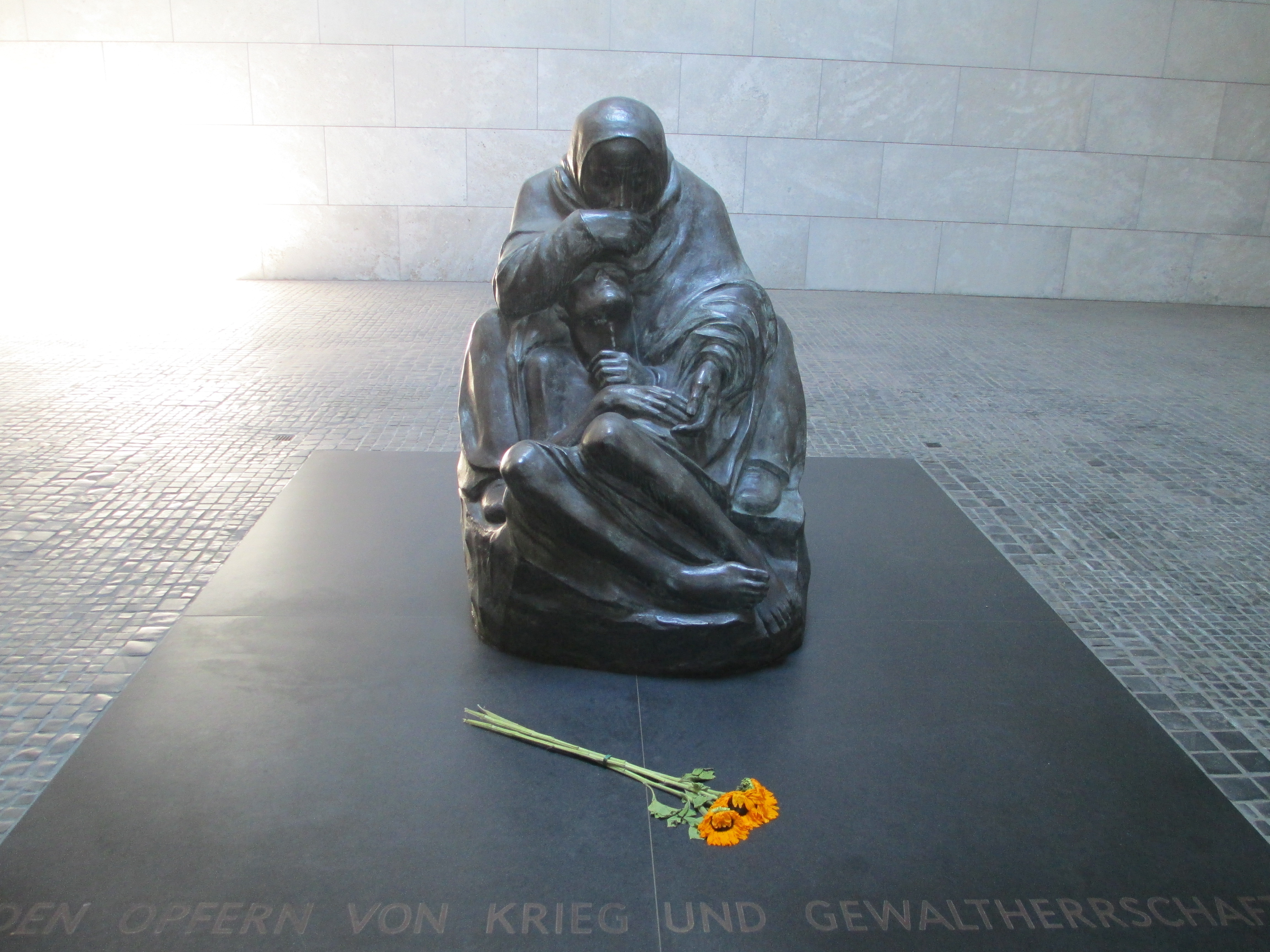 הפסל "אם עם בנה המת" (פייטה) בבית המשמר החדש בברלין